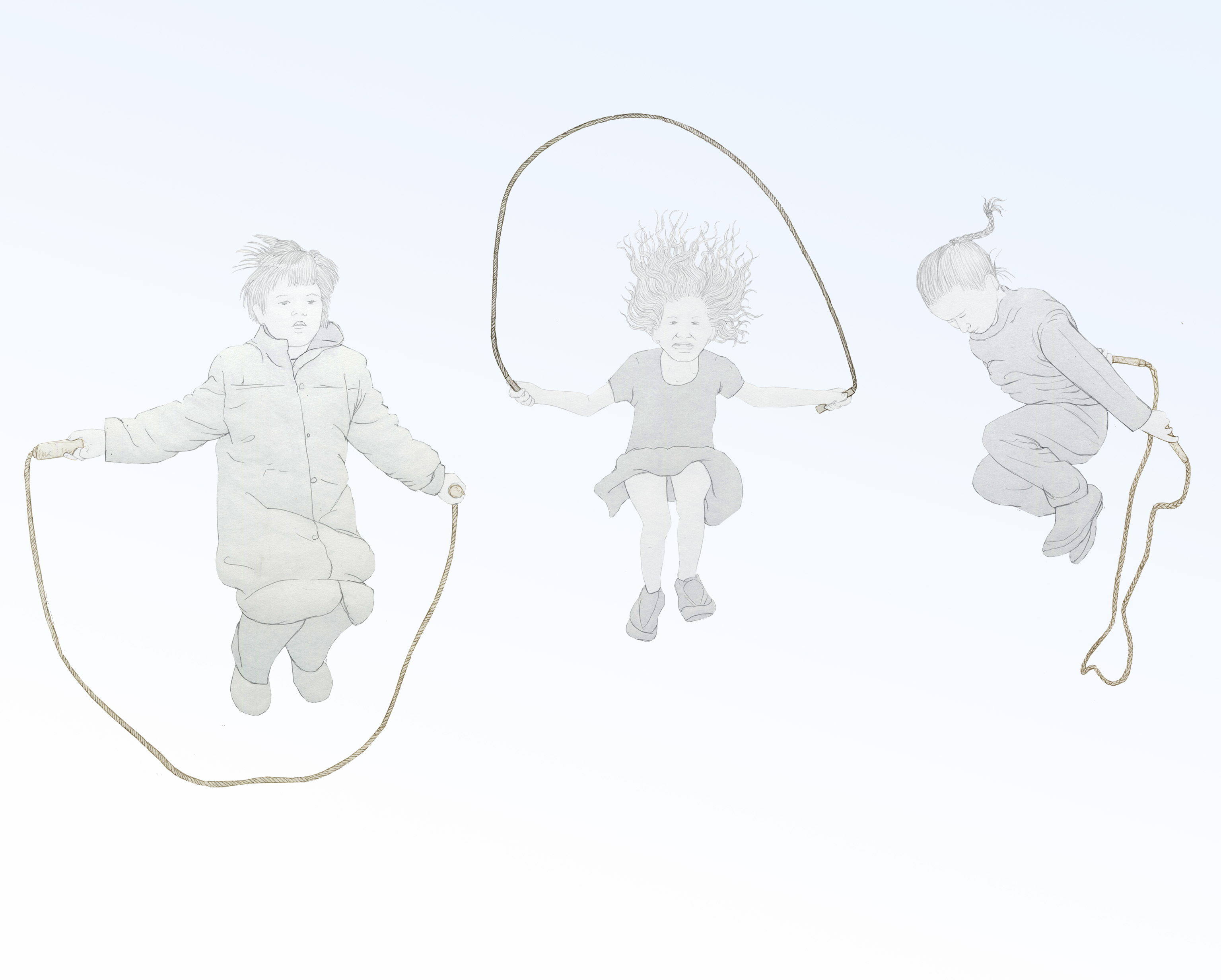 El joc a les societats rurals. La imatge busca il·lustrar el procés de joc, tant la creació de regles com la cerca de materials per a crear joguets. Cada imatge il·lustra diferents activitats que a dia de hui serien considerades perilloses o inapropiades. Autor de la il·lustració: Andrés Marín Jarque